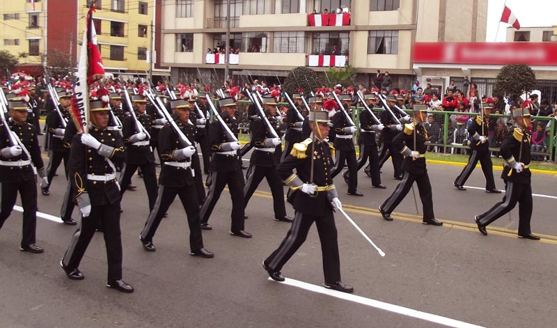 EMCH 2012